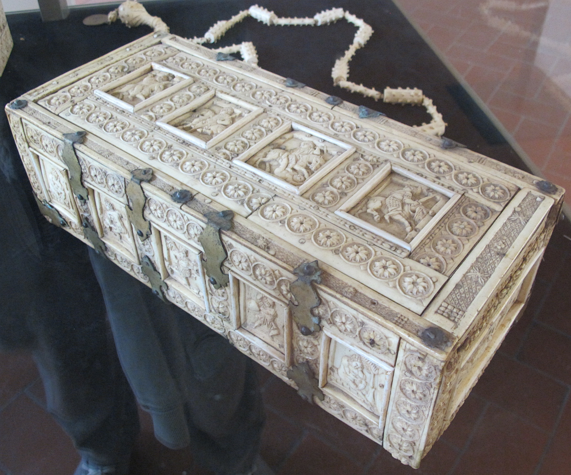 Museo Nazionale d'Arte Medievale e Moderna - MIBAC This is a photo of a monument which is part of cultural heritage of Italy.